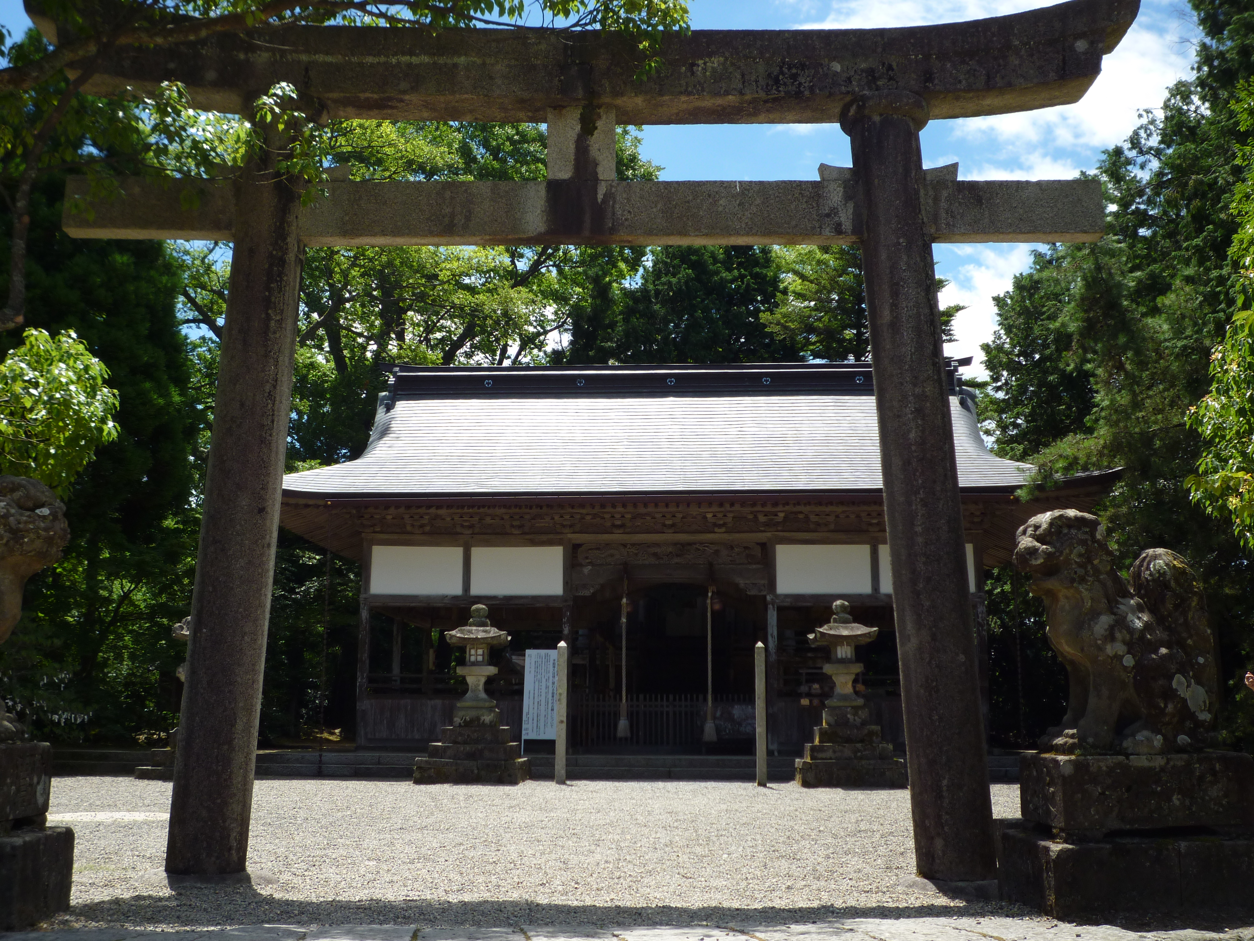 浦嶋神社 正面 2010年8月9日撮影